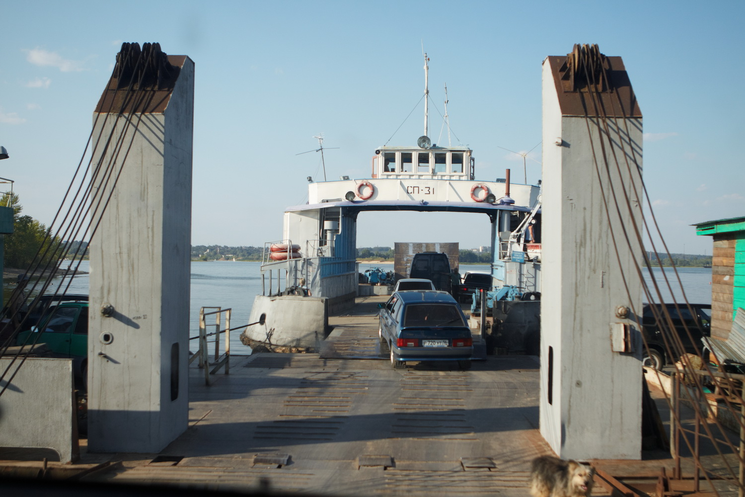 Паром СП-31 на линии Нижние Вязовые-Зеленодольск